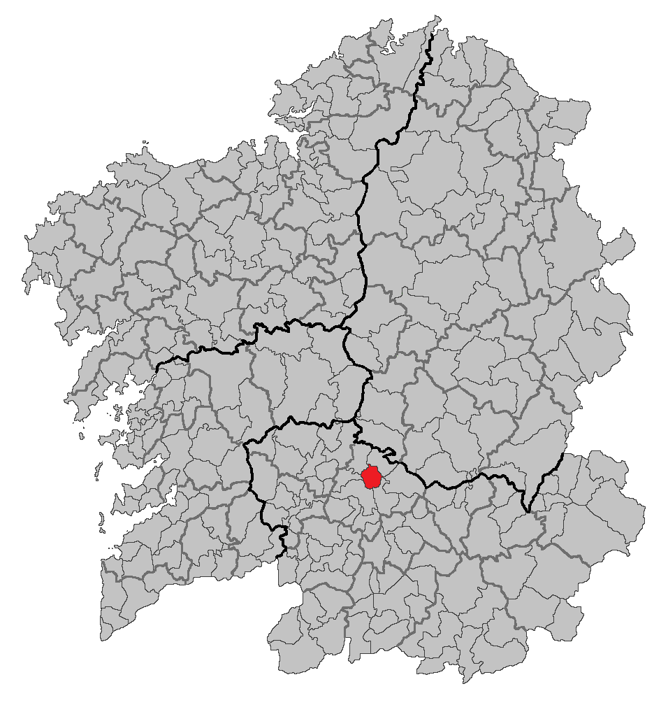 Mapa coa localización do concello de Coles.